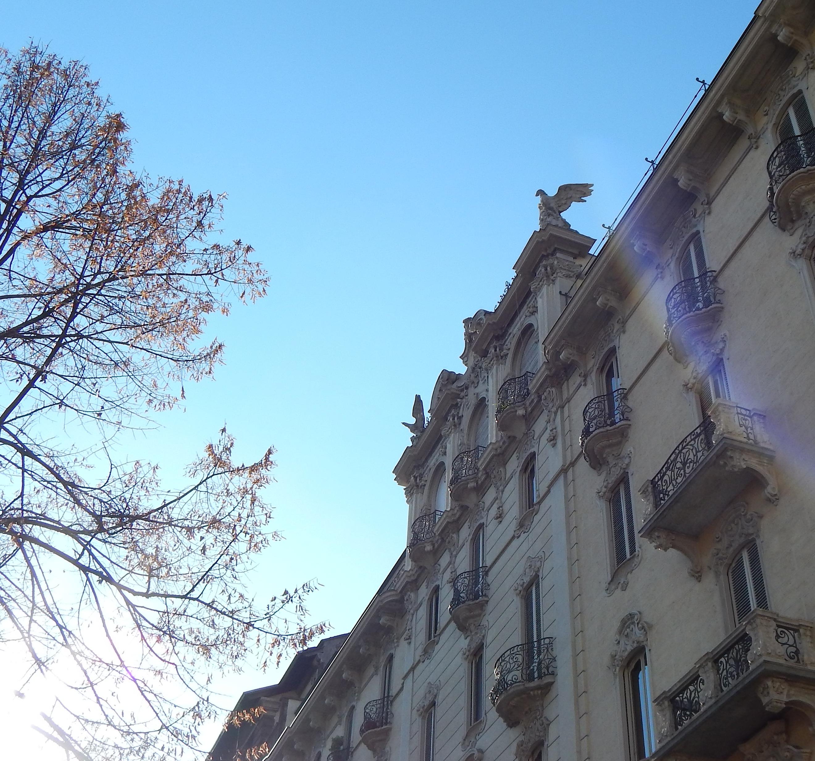 Una veduta del quartiere torinese Cit Turin